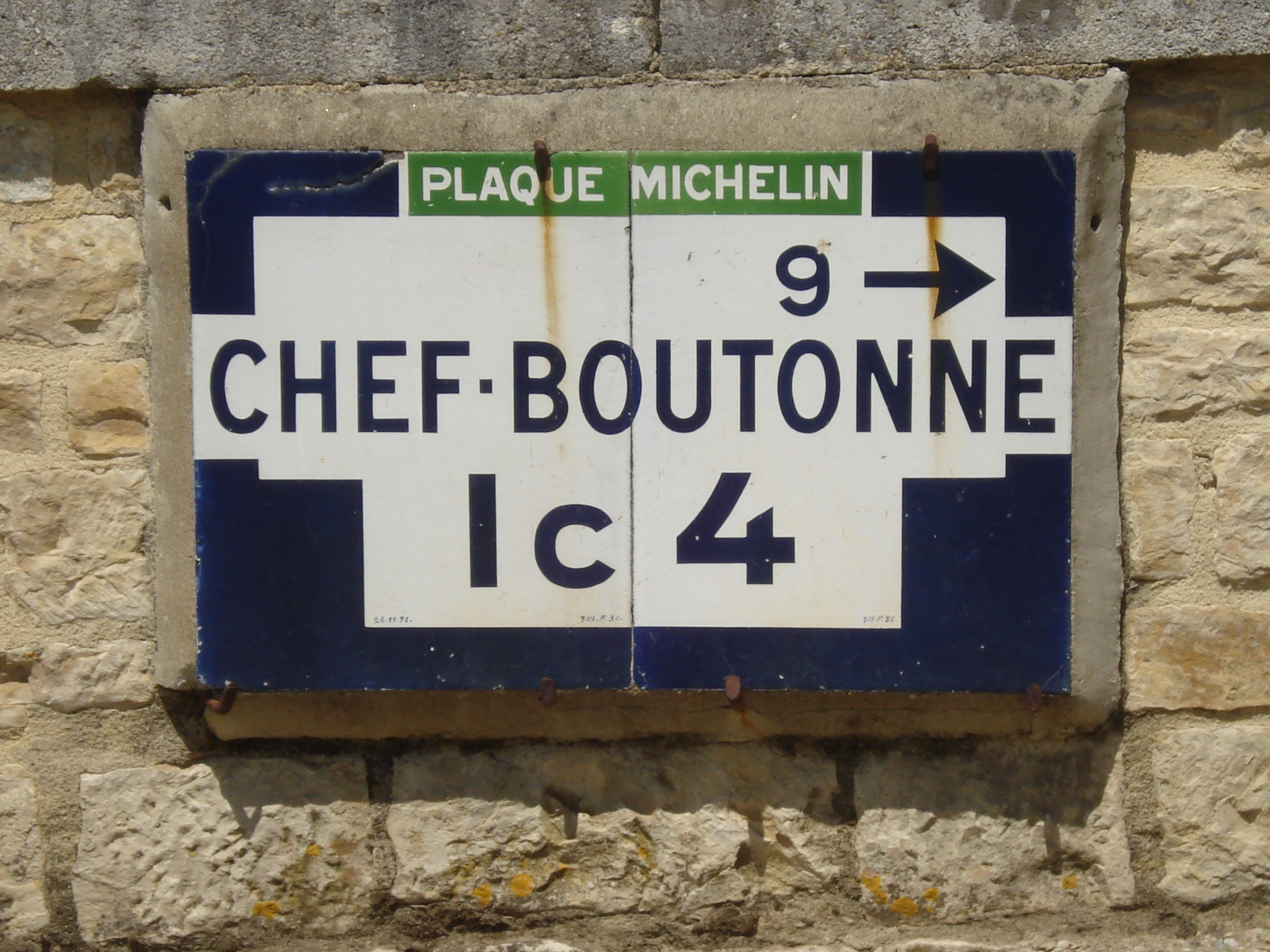 La plaque Michelin d'Aubigné (Deux-Sèvres)